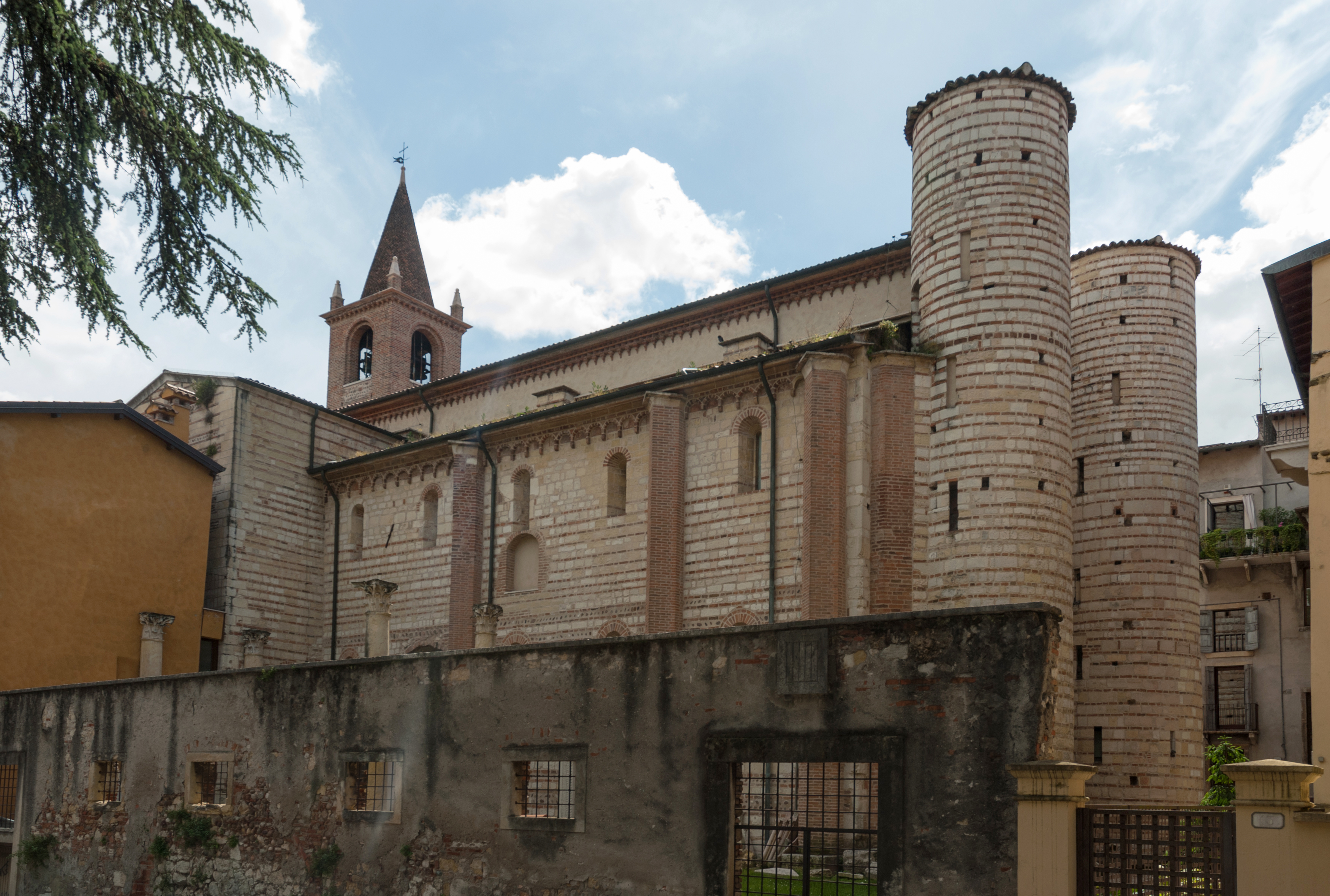 San Lorenzo a Verona dal ovest